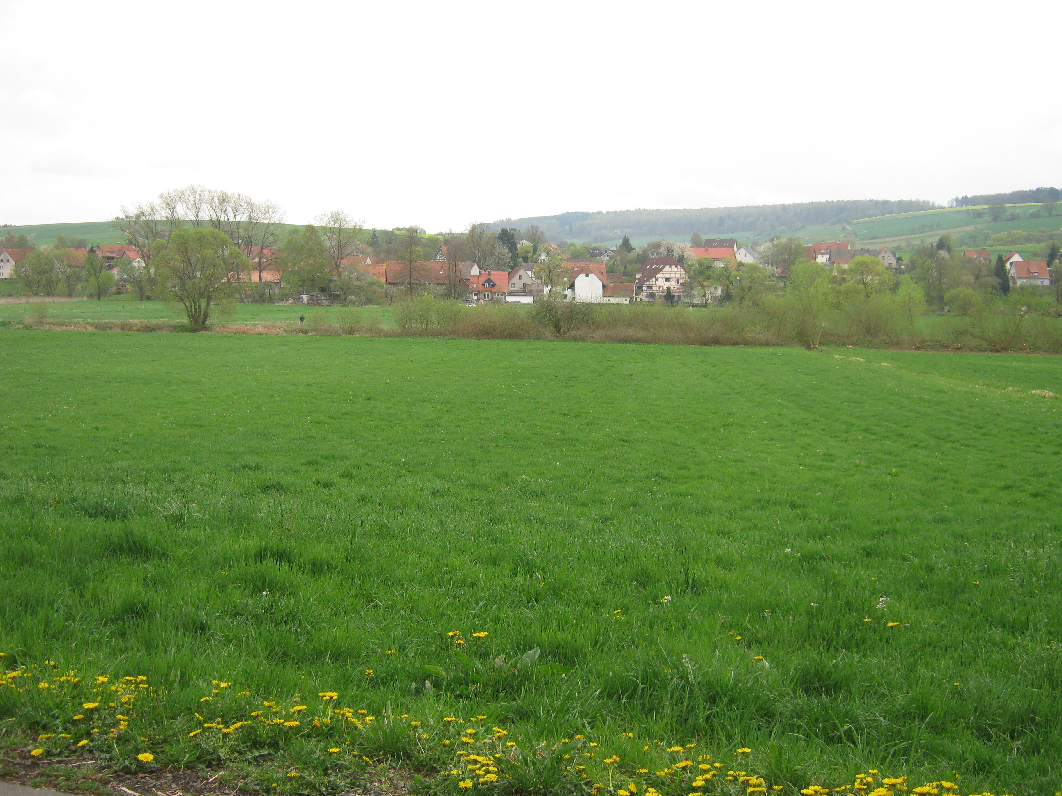 Blick auf die Bleichwiesen in Vernawahlshausen, Gemeinde Wahlsburg, in der Mitte das Flußbett der Schwülme. Die Bleichwiesen dienten der sogenannten Rasenbleiche von Rohleinen, sie waren eine der größten Bleichewiesen in Hessen. Am vorbeiführenden Weg (Zugang zum Haltepunkt Vernawahlshausen) steht eine ausführliche Erläuterungstafel des Eco Pfad Kulturgeschichte Wahlsburg.